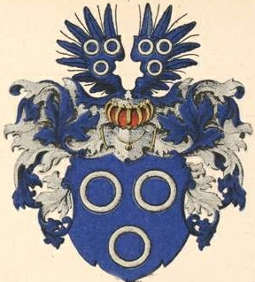 Freytag von Loringhoveni ja Freytag gen. Loringhoffi suguvõsa aadli- ja parunivapp